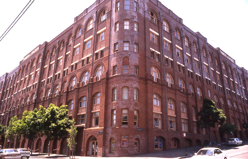 warehouse, sydney